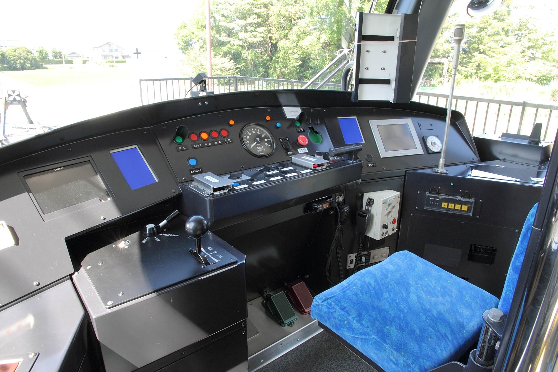 福井鉄道F1000形 (F1001) の運転台